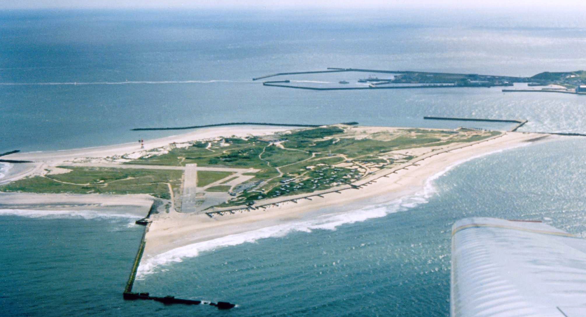 Helgoland, Blick aus einem Flugzeug auf die Insel „Düne“